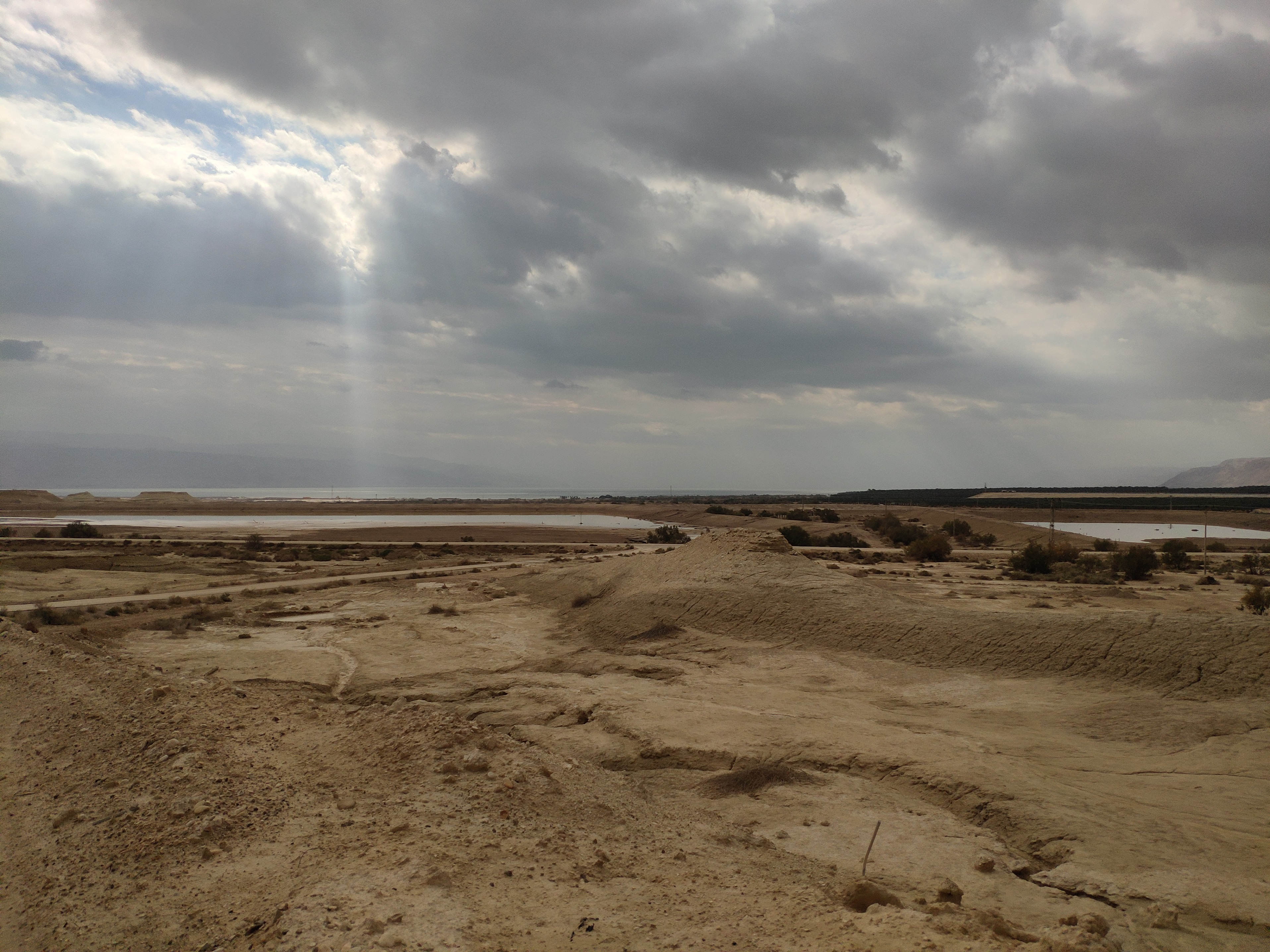 בריכות השמש הנטושות סמוך לבית הערבה